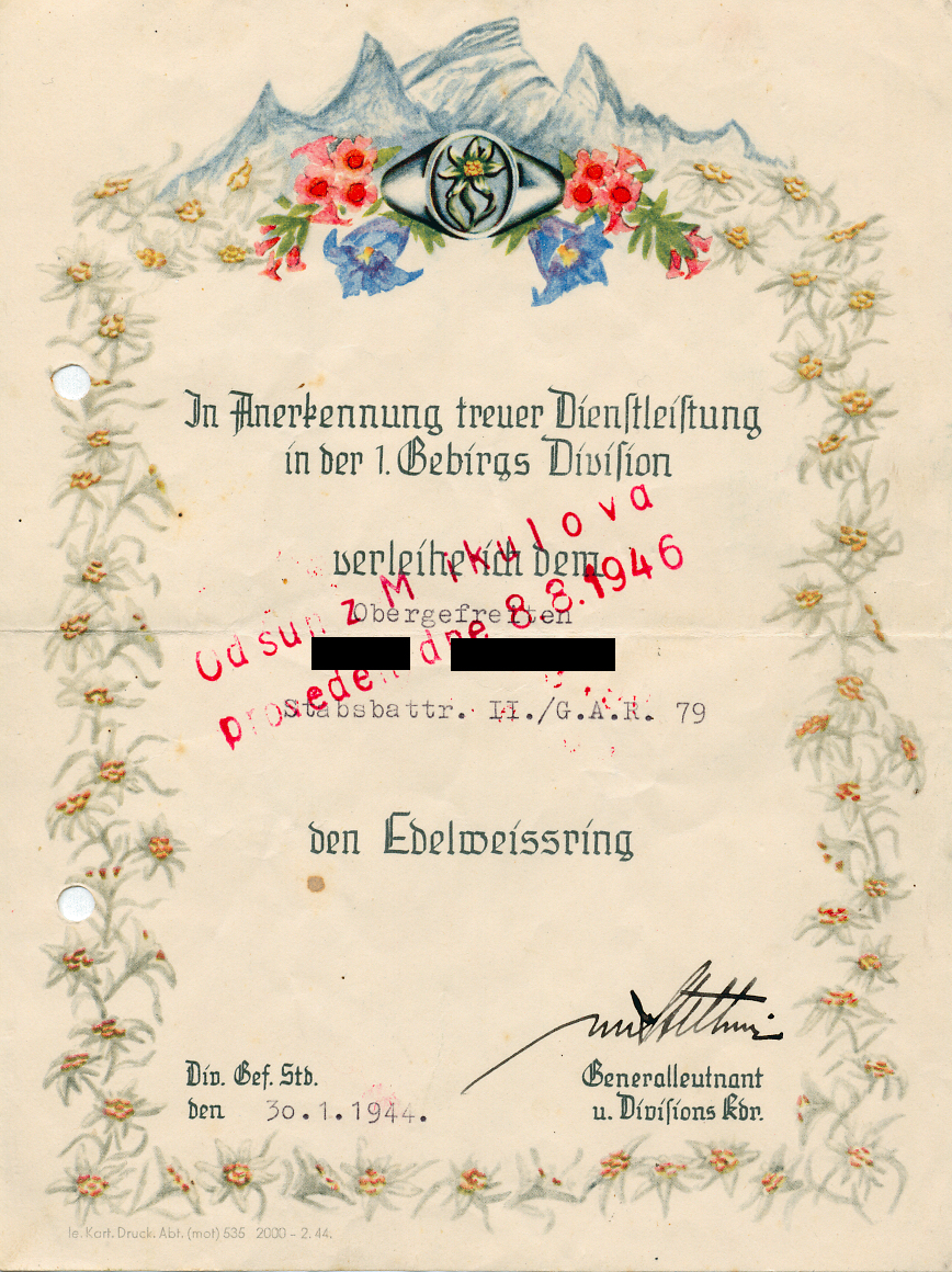 Deutsches Reich, Armee-Ehrenzeichen, Verleihungsurkunde (1944)